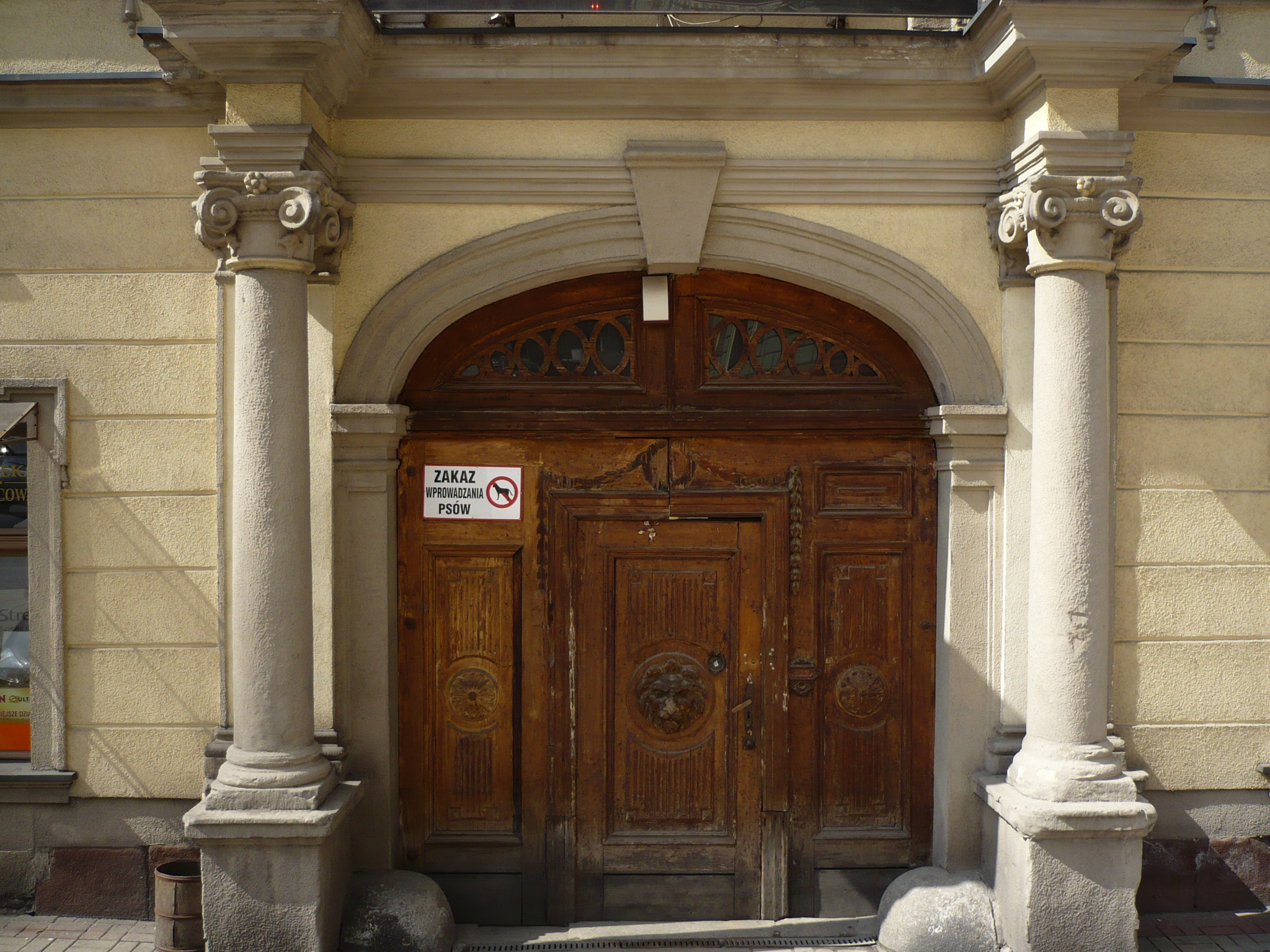 Nowa Ruda, ul. Piłsudskiego 2 - zamek Stillfriedów, obecnie biura, 1416, 1650, 1730 (zabytek nr A/935/1559 z 16.03.1966)